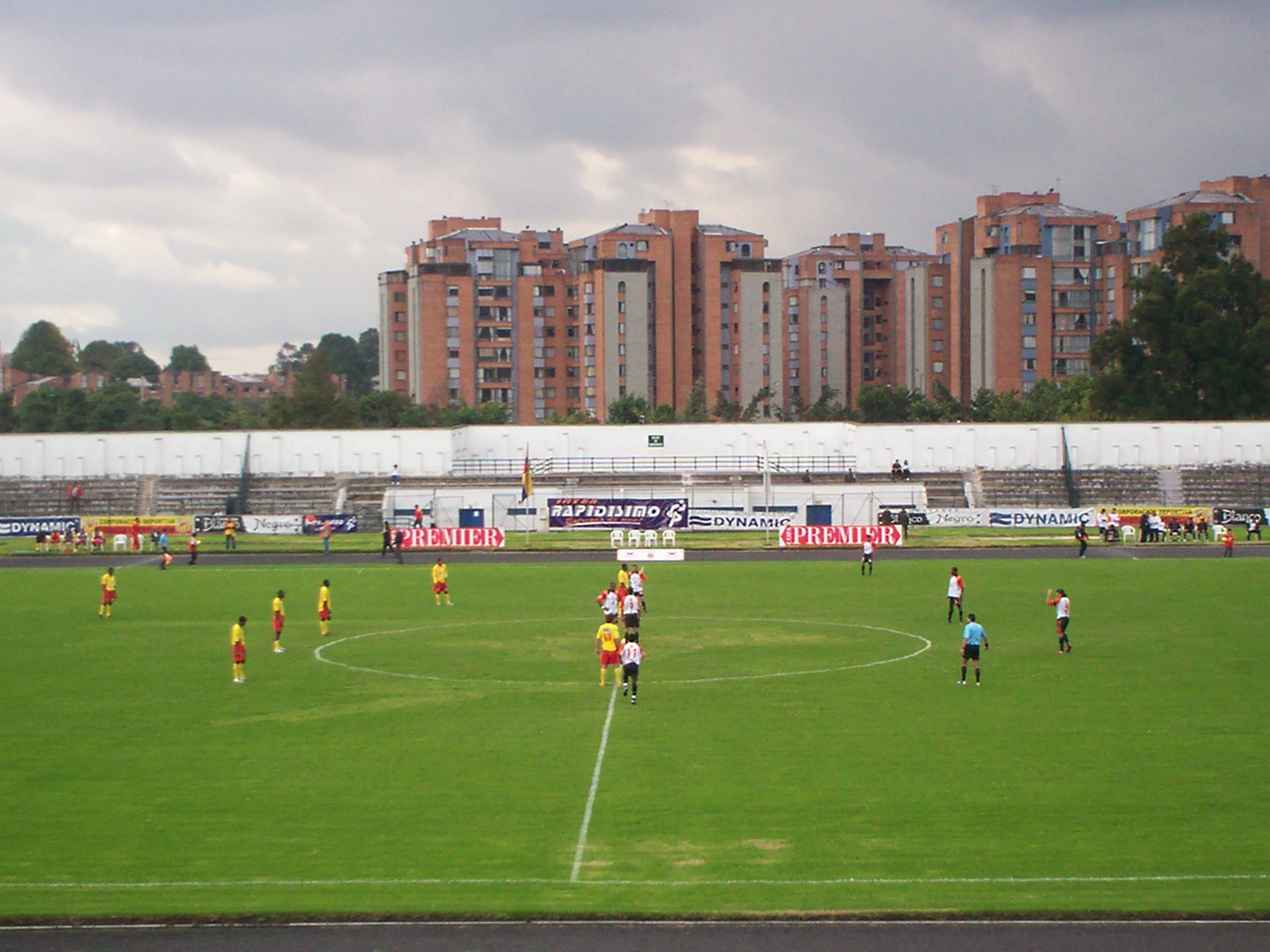 Partido Bogotá FC vs Academia FC de la Primera B colombiana